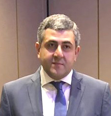 Zurab Pololikashvili, georgischer Diplomat und Generalsekretär der Welttourismusorganisation UNWTO (2018)